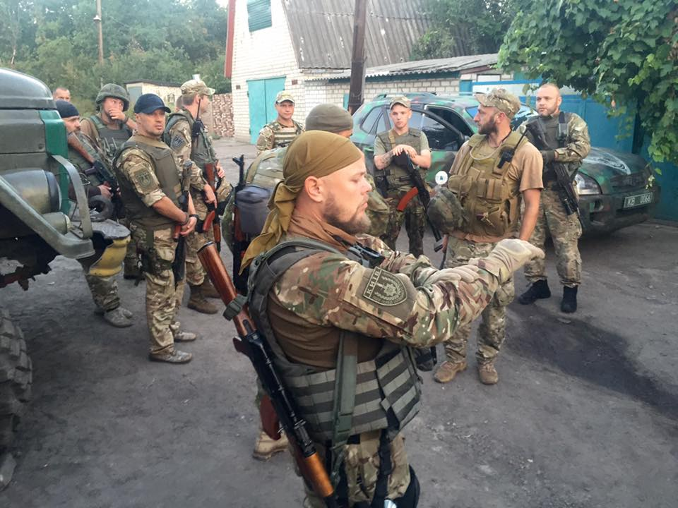 Боєць полку поліції "Київ" в Авдіївці